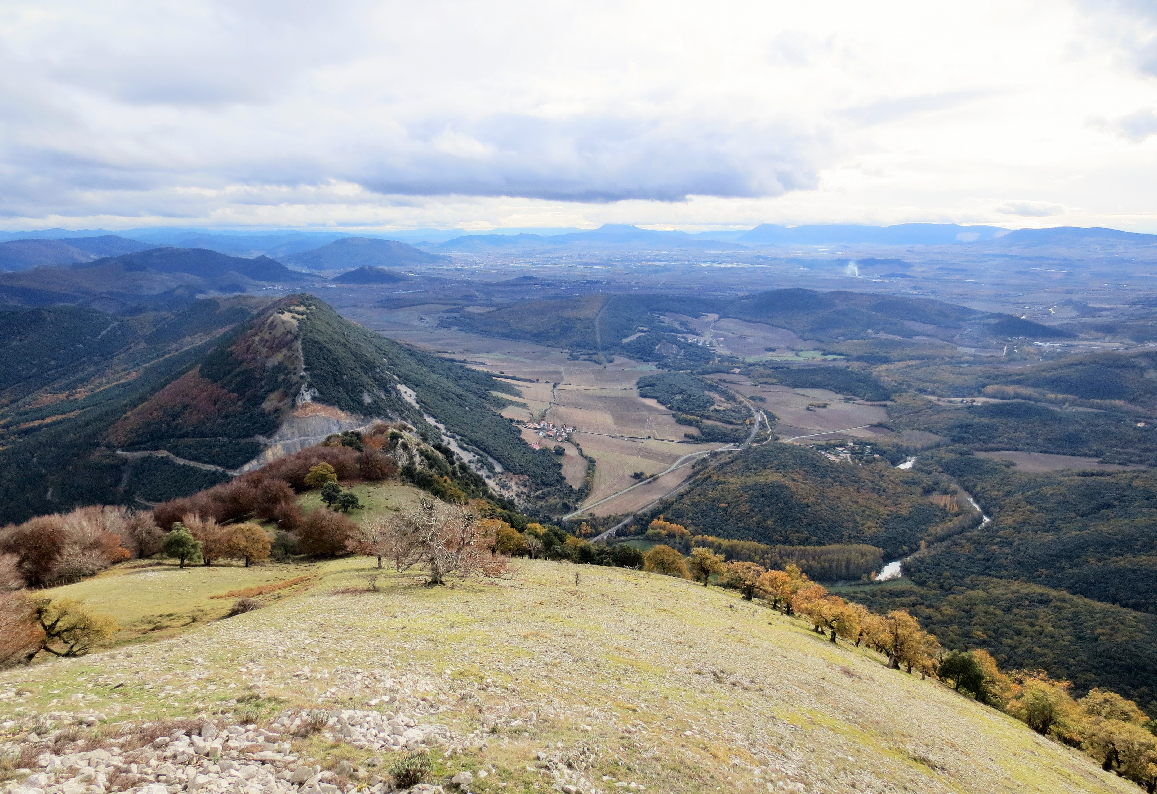 Iruñerria Gaztelu gailurretik, Arakil ibaiak zeharkatzen duen Oskiako pasartetik gora